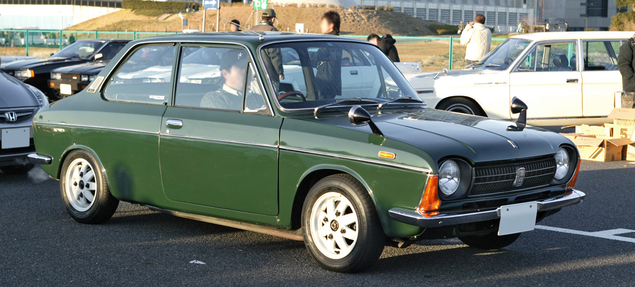 Subaru 1300G